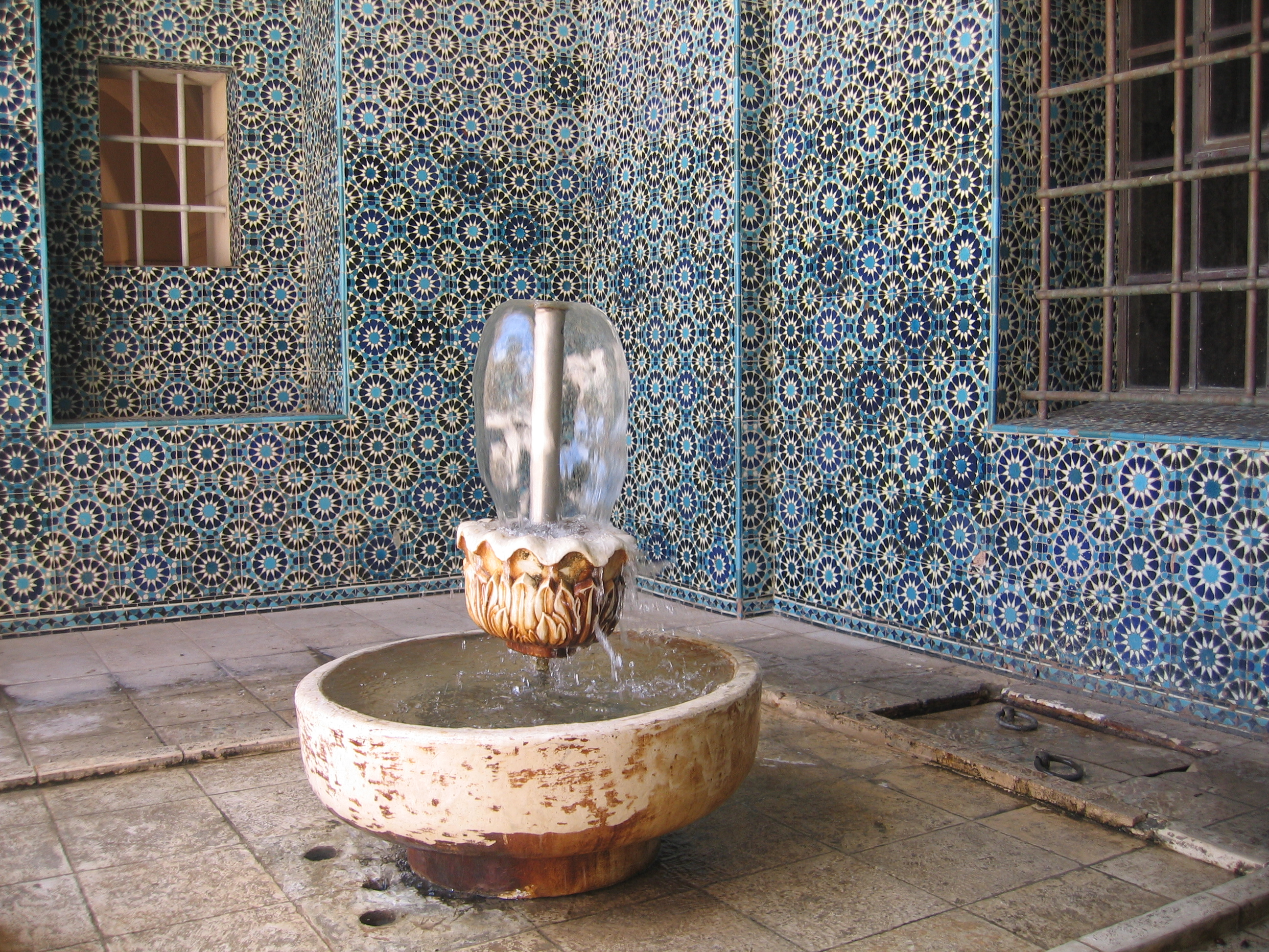 המזרקה במוזיאון רוקפלר